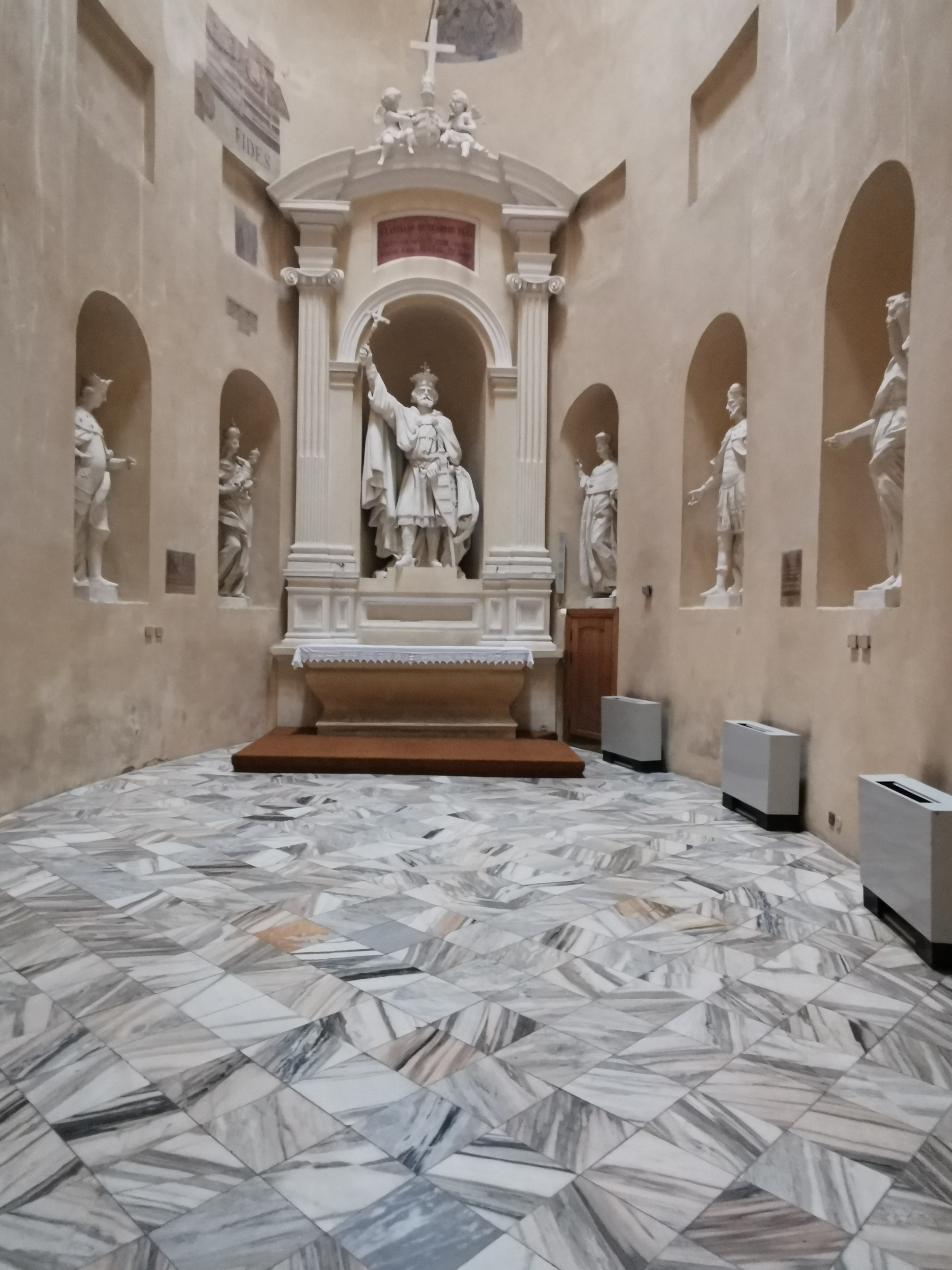 Šventojo Vladislovo kolyčia